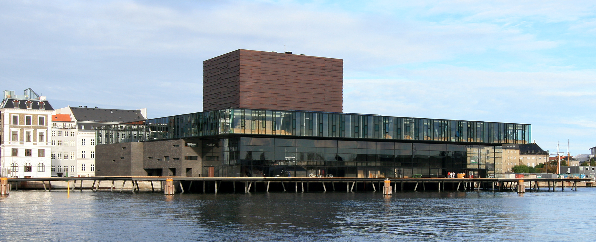 Skuespilhuset, Copenhagen.